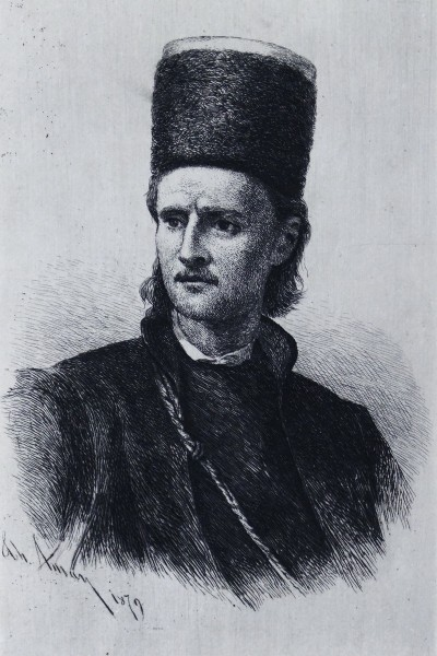 Theodor Aman - Tudor Vladimirescu, gravură, semnat stânga jos, 19 x 16 cm.